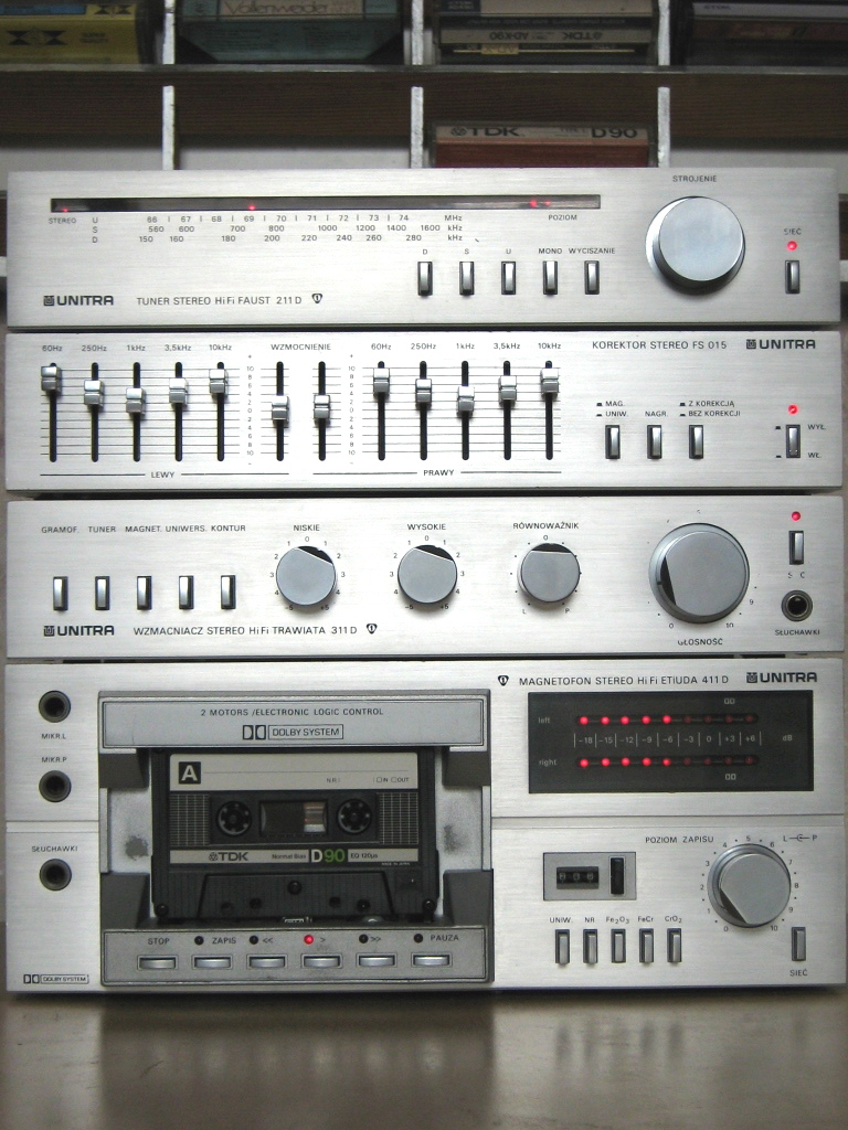 Wieża stereo Hi-Fi Mini Line firmy Unitra-Diora